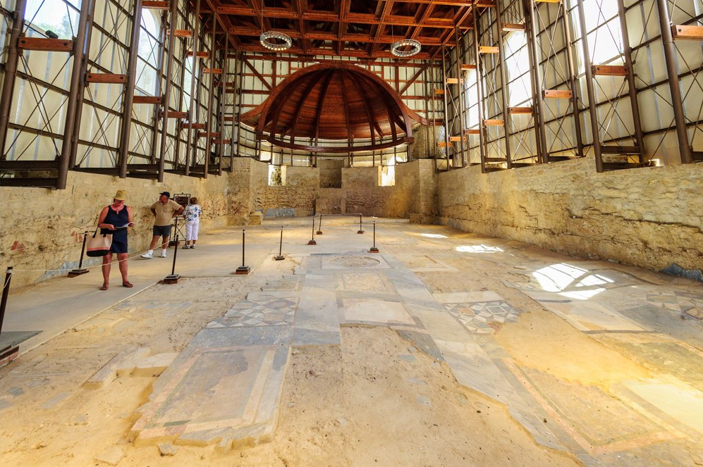 Piazza Armerina, Sicily